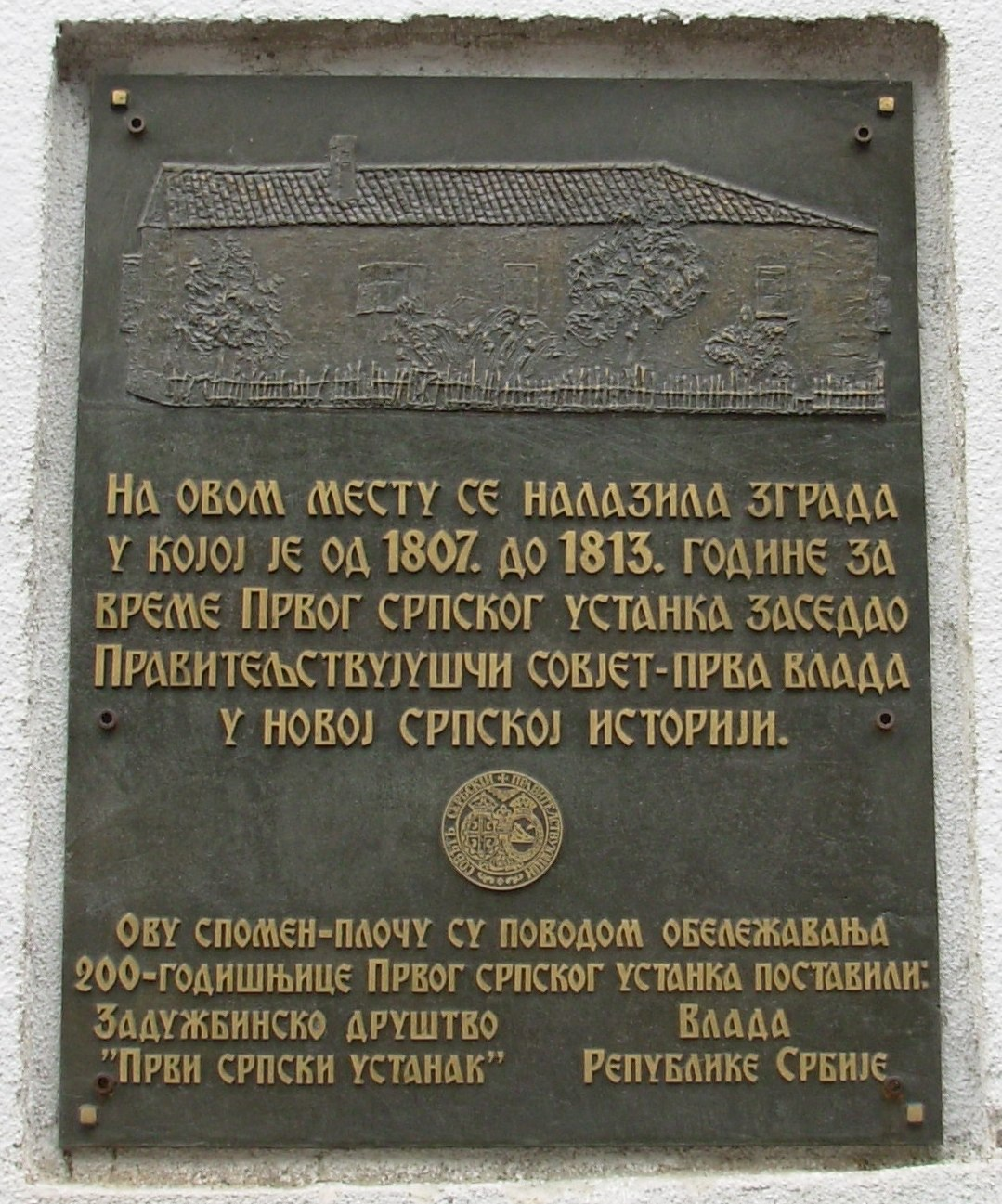 Табла у улици Браће Југовића, Београд. Сликао Голдфингер